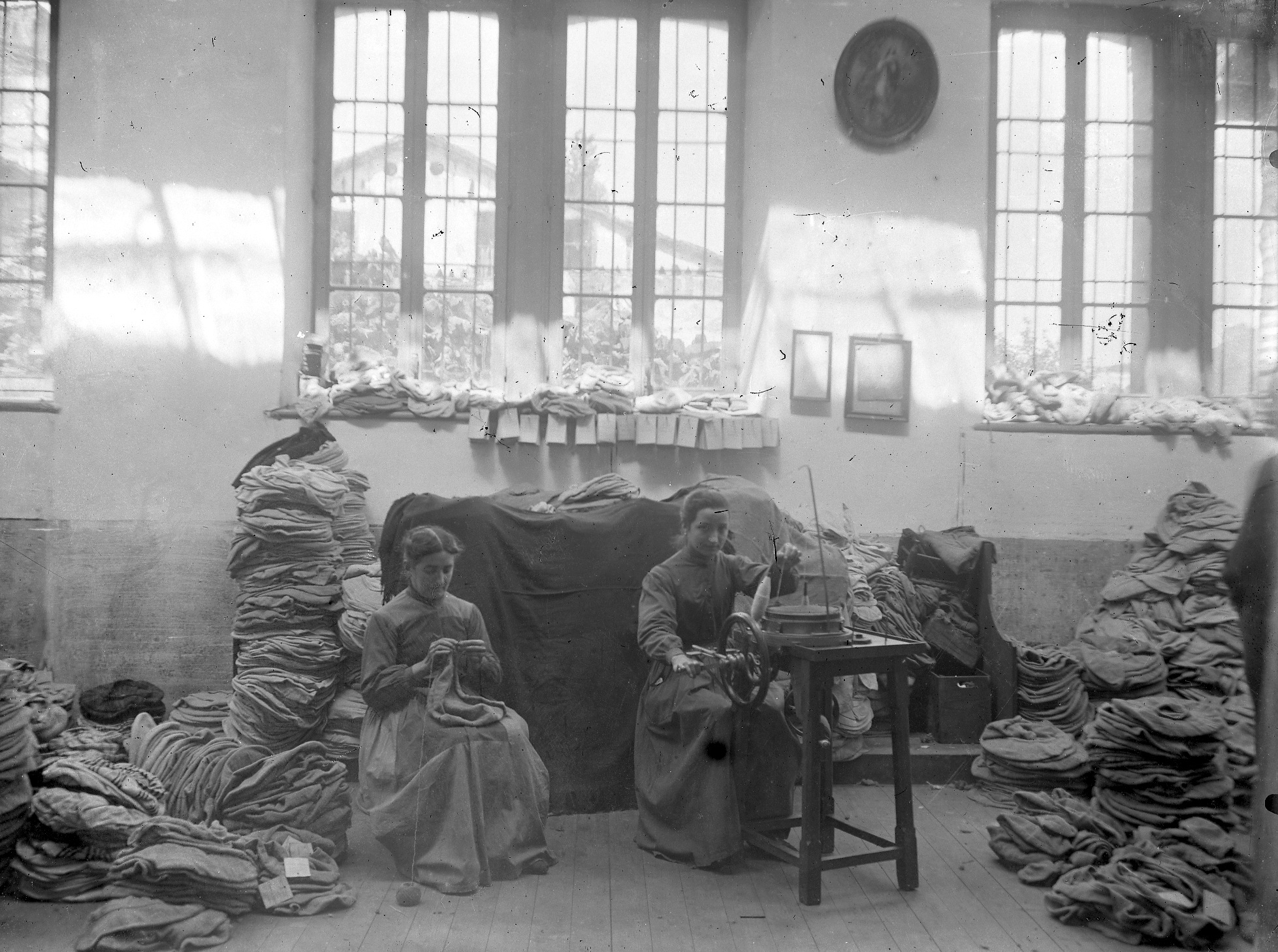 Emakumeak Elosegi txapel fabrikan lanean, 1903